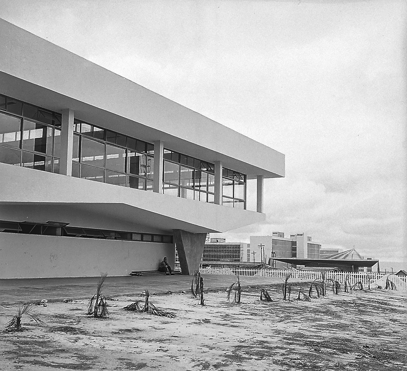 Imagem do Fundo Agência Nacional, do Arquivo Nacional